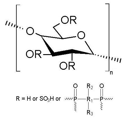 coex chem formula